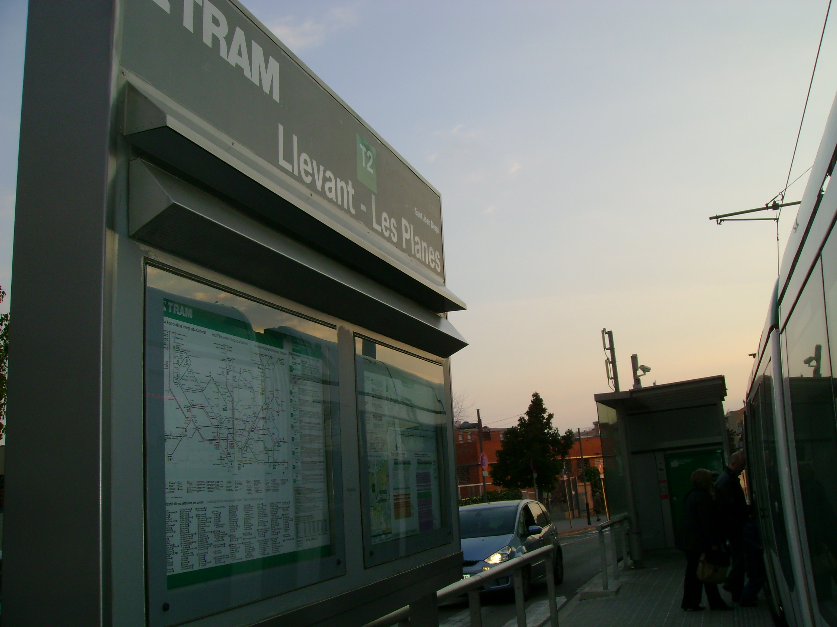 Foto capturada per la meva càmara a l'estació de Llevant - les Planes (Trambaix).